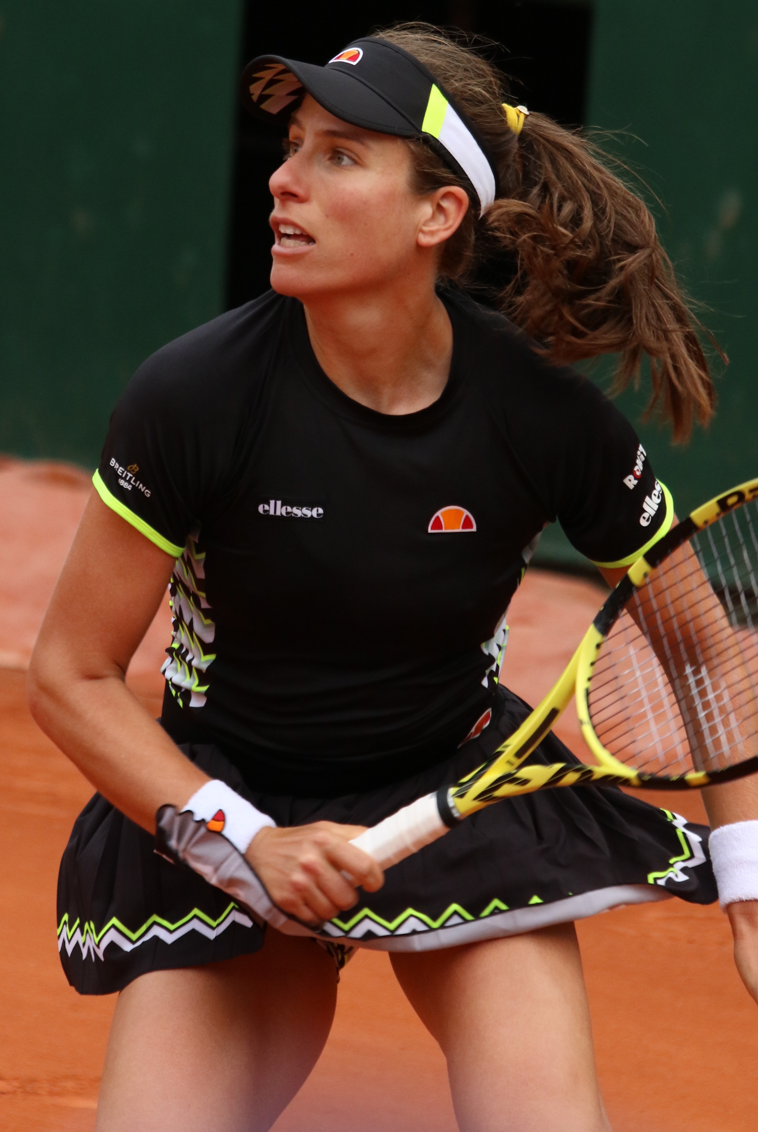 Konta RG19 (29)